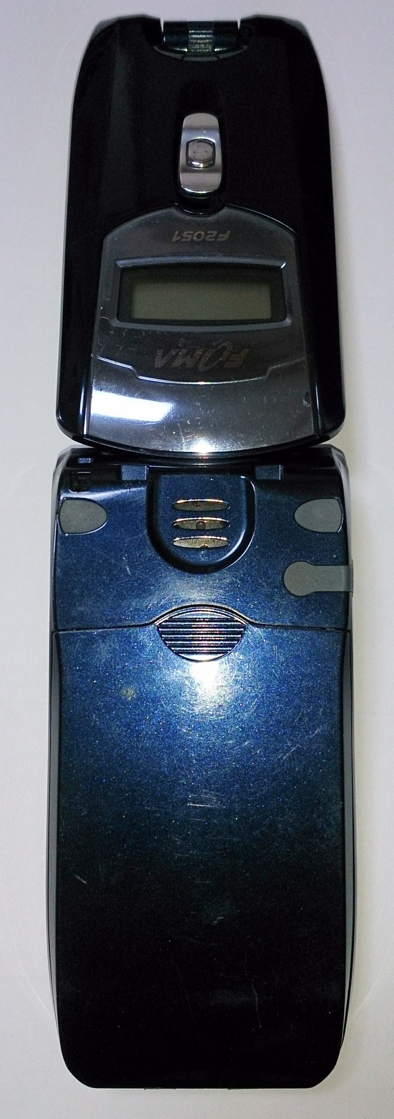 F2051